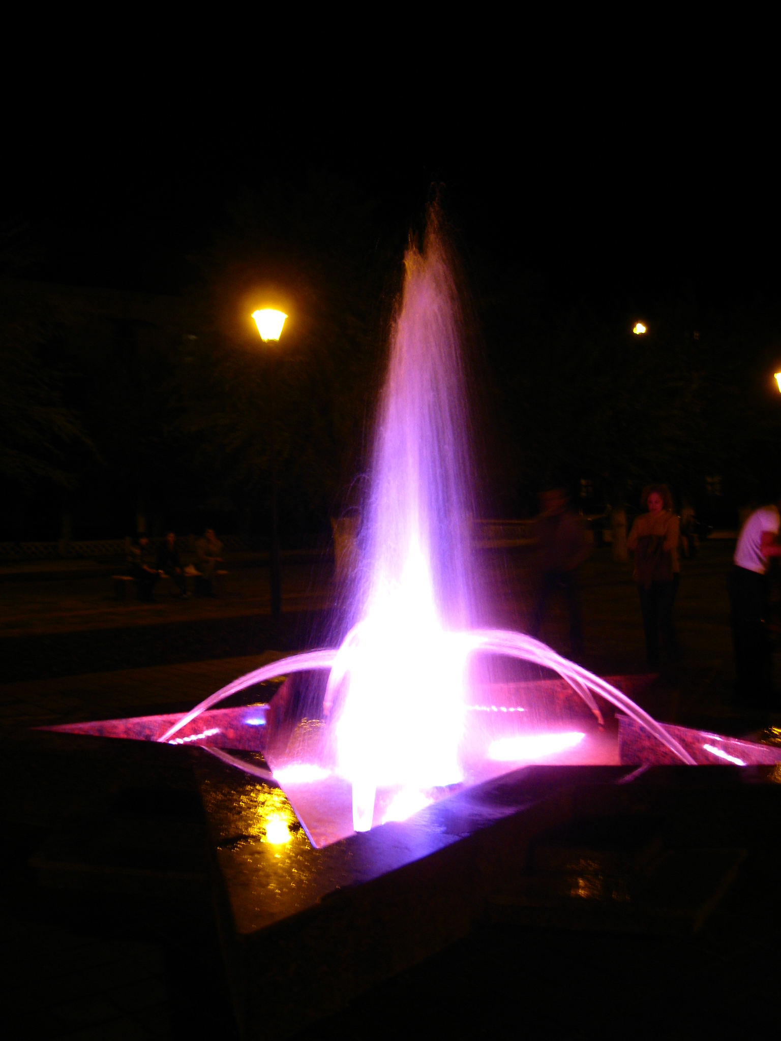 фонтан Звезда победы, Ахтубинск, Россия, 9 мая